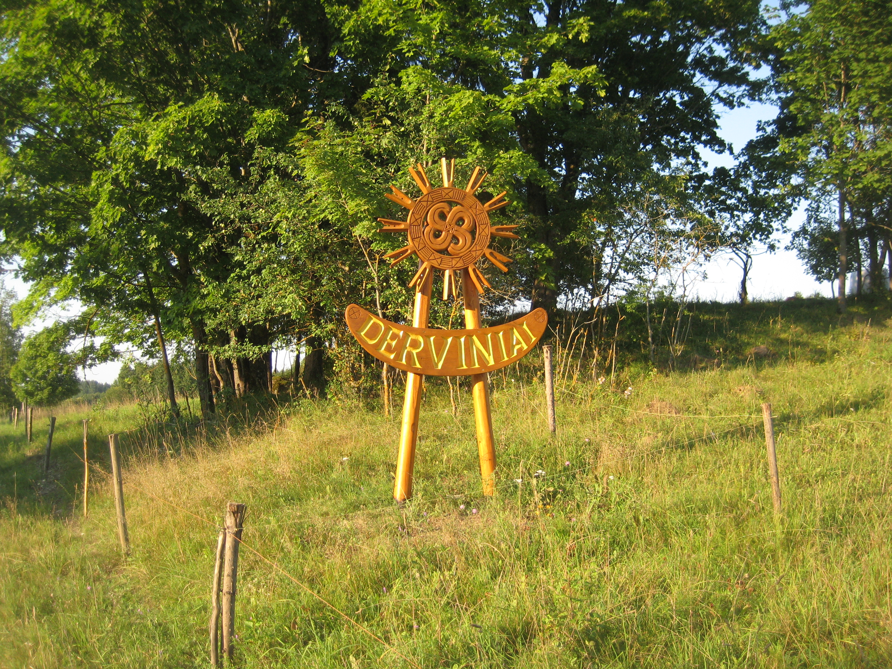 Antazavės sen., Lithuania